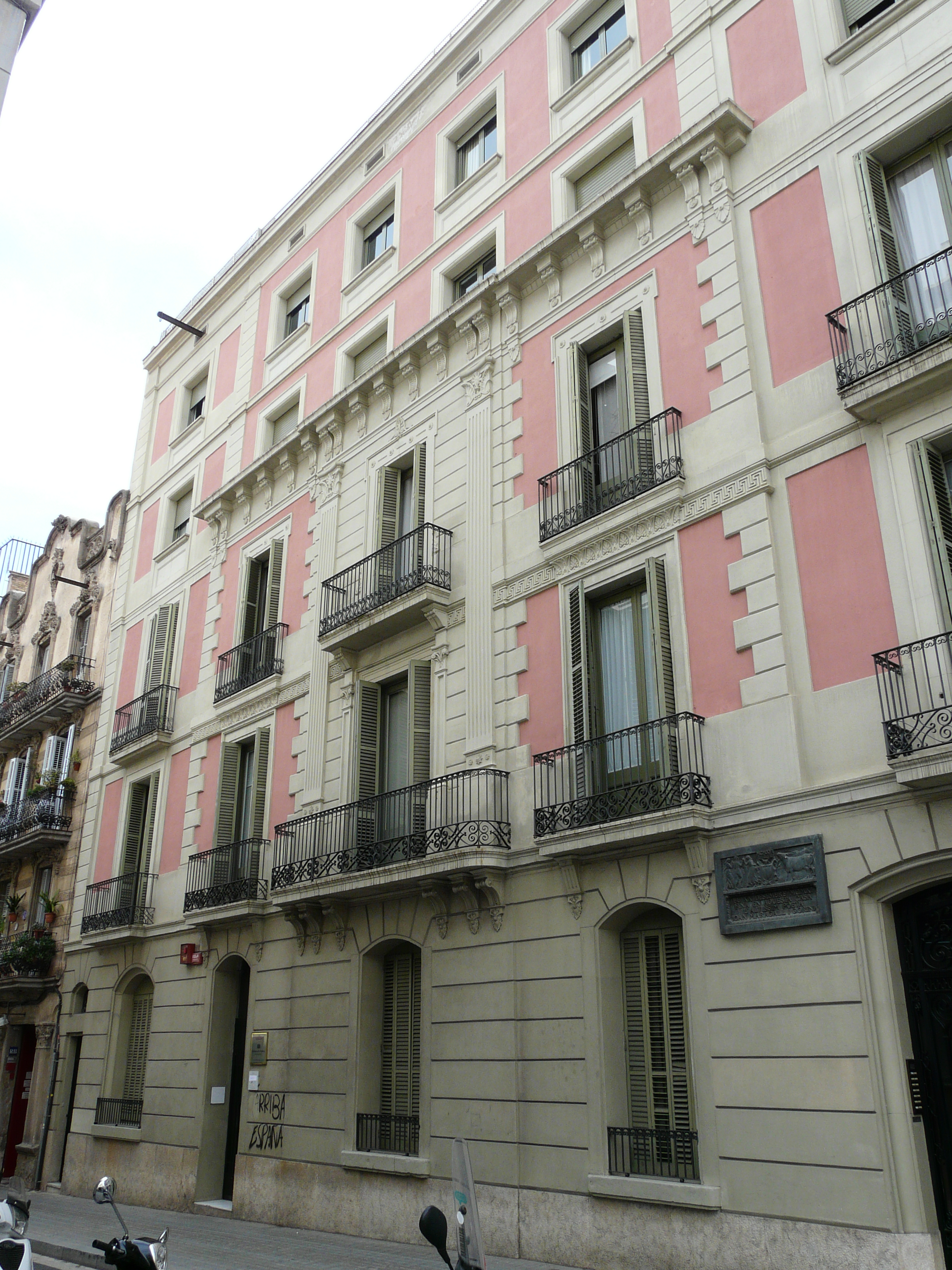 Joan Maragall. A la casa on va viure Maragall i on ara hi ha l'Arxiu Maragall. C. Alfons XII, 79 (Sant Gervasi) 23″ N, 2° 08′ 49.78″ E